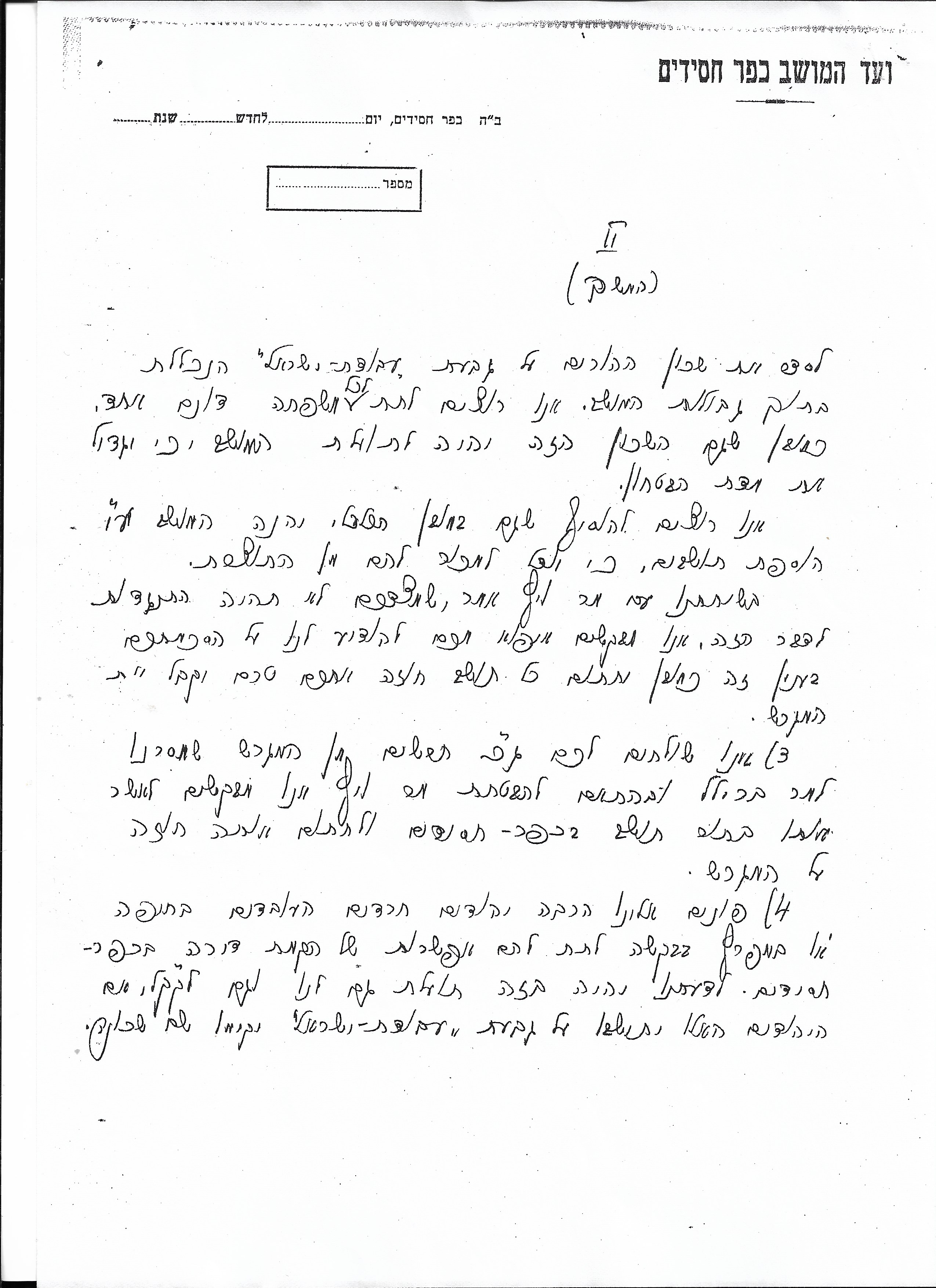 המשך המכתב